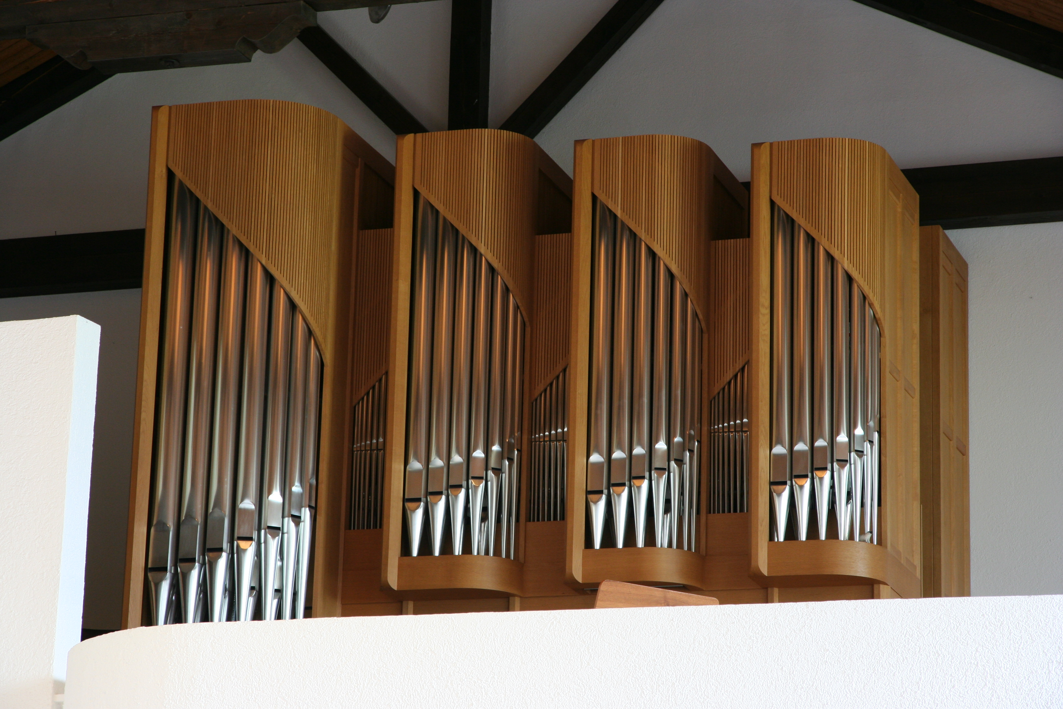 Römisch-katholische Pfarrkirche Liebfrauen Hinwil, Orgel